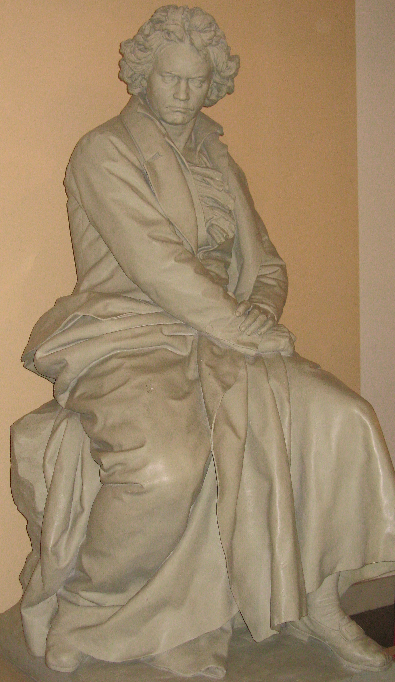 Modell des Beethoven-Denkmals (1878) von Caspar von Zumbusch im Wiener Konzerthaus